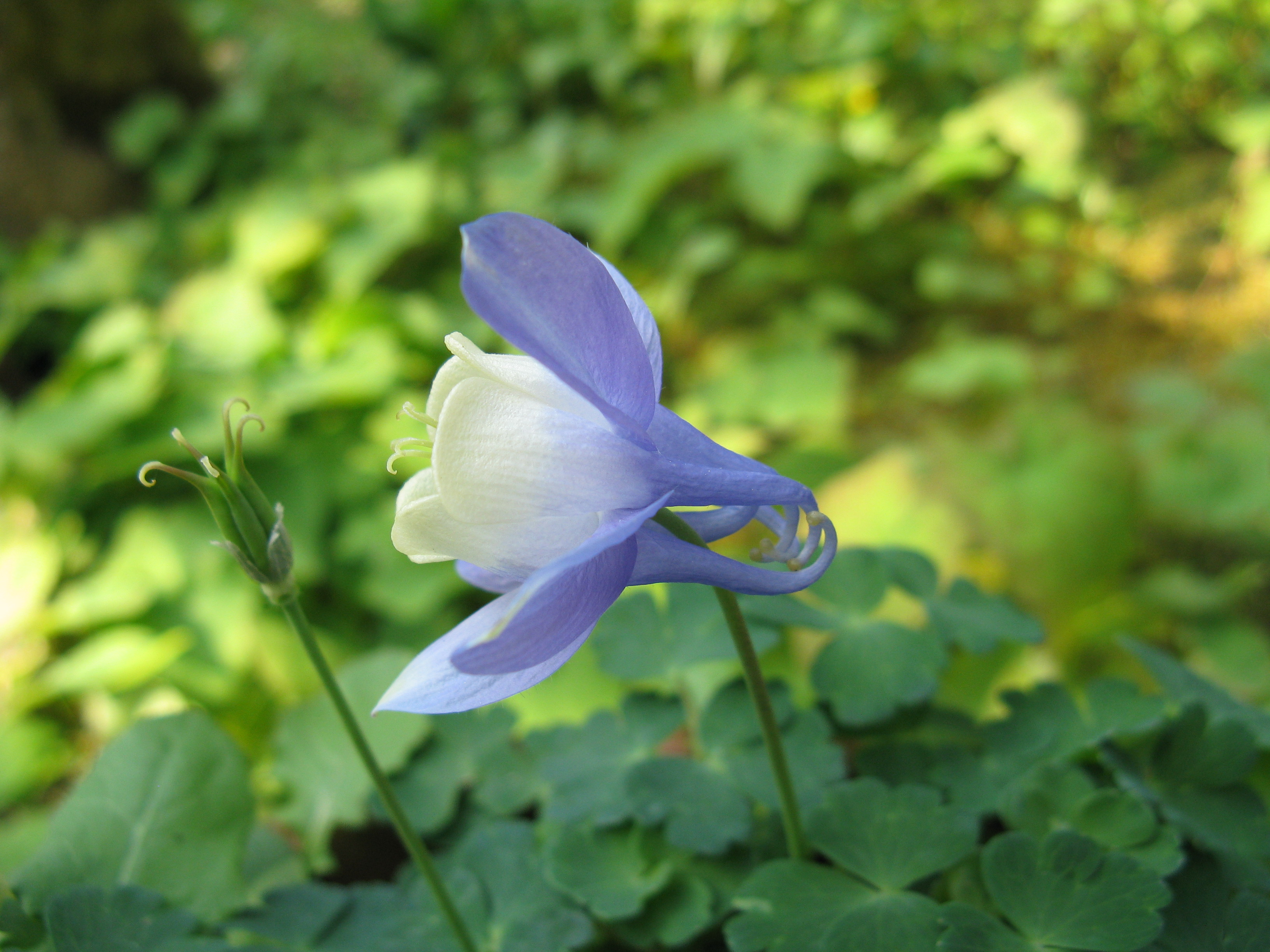 Scientific name Aquilegia sibirica Place:Osaka Prefectural Flower Garden,Osaka,Japan